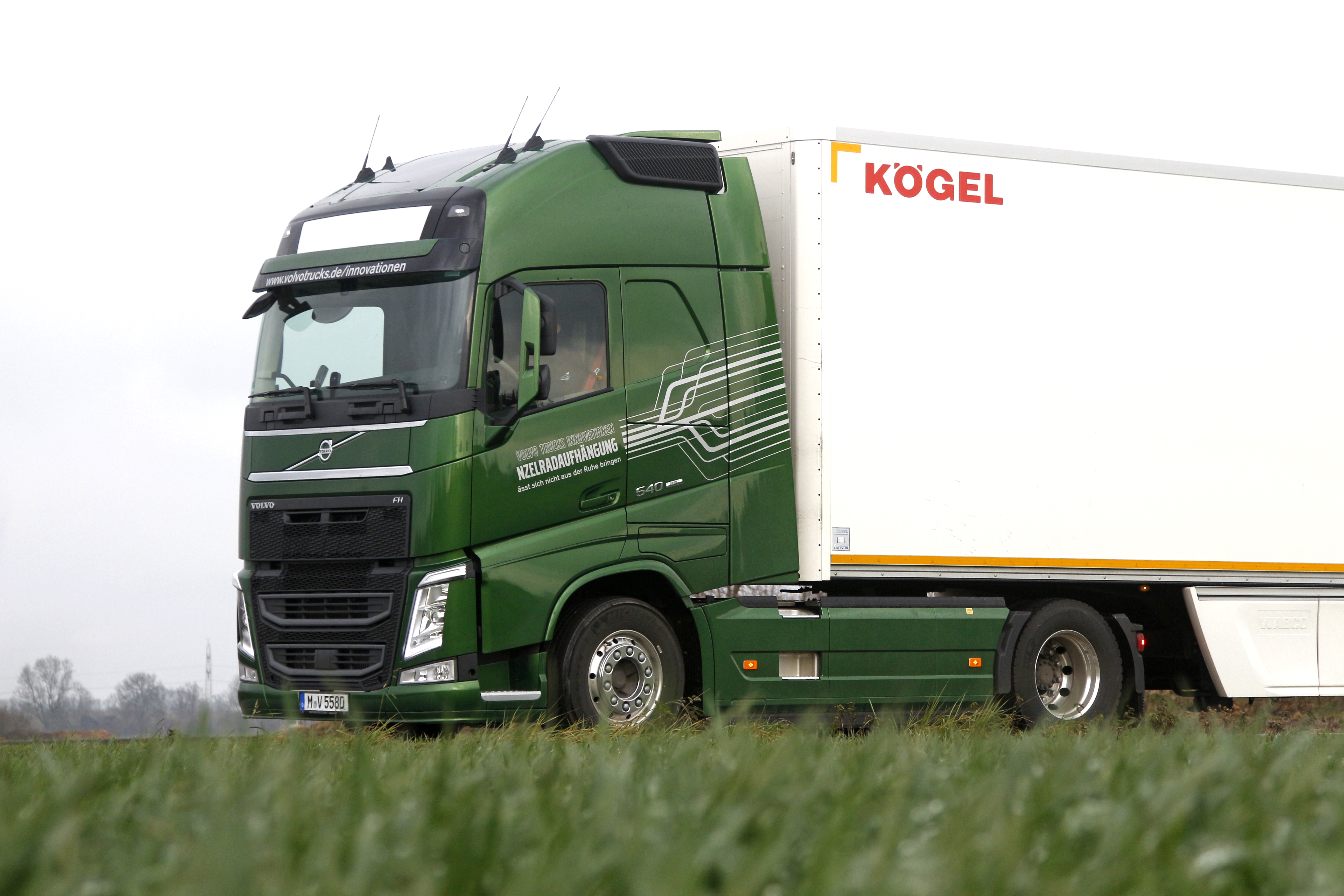 Baureihe FH von Volvo Trucks